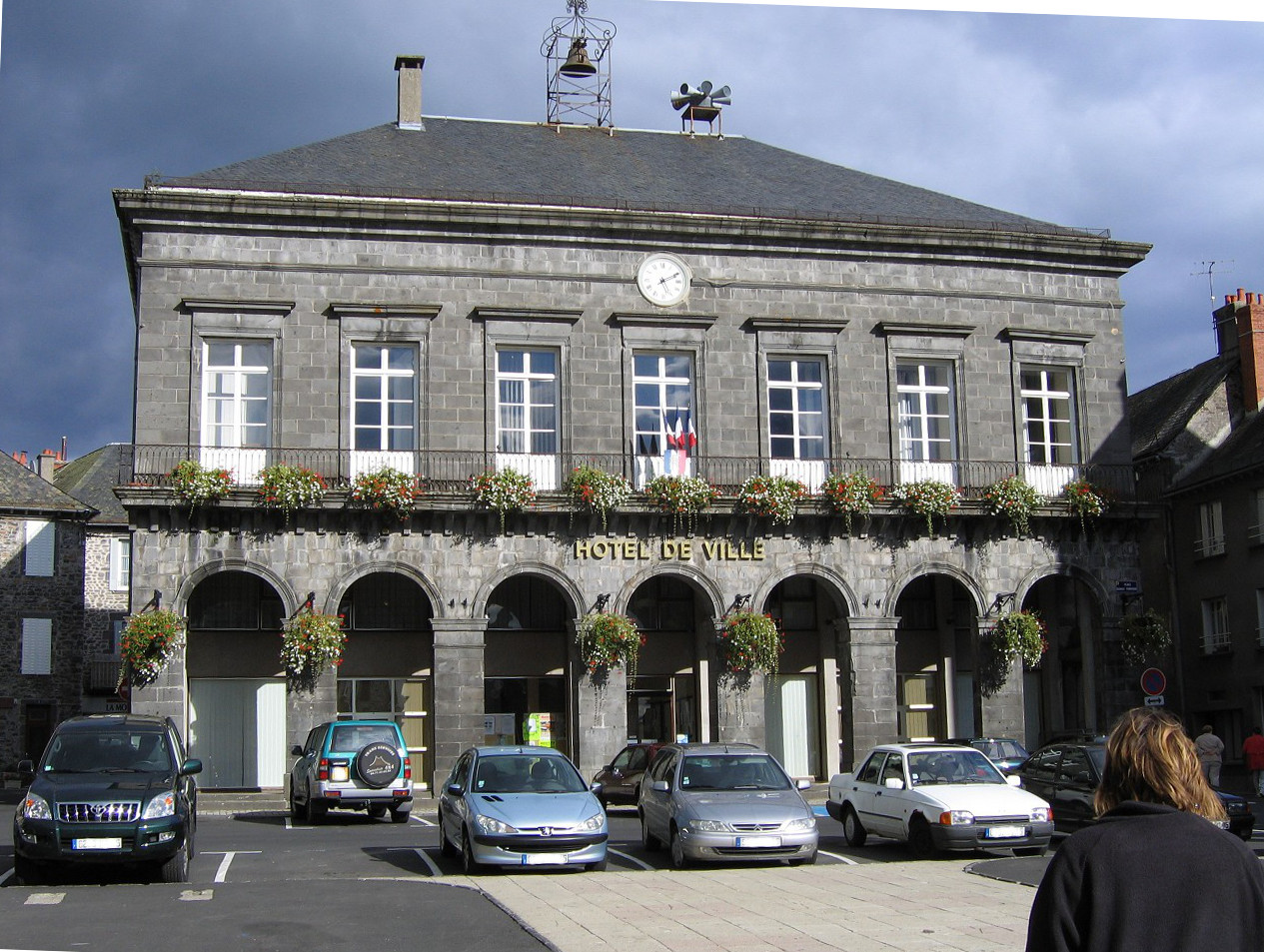 Bildbeschreibung: Rathaus in Mauriac